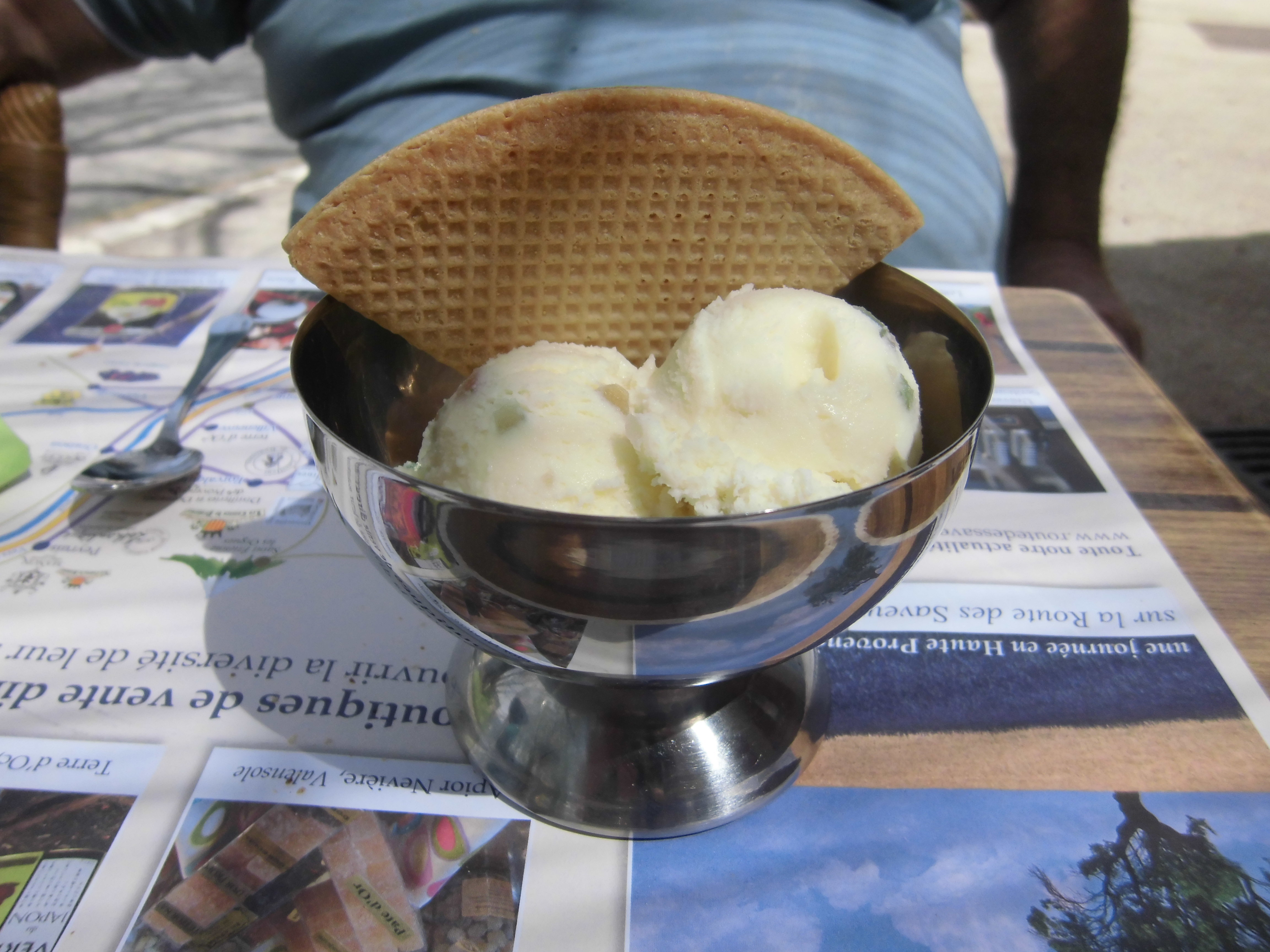 glace plombière au fruits confits d'Apt, au Bistrot de Pays de Niozelles